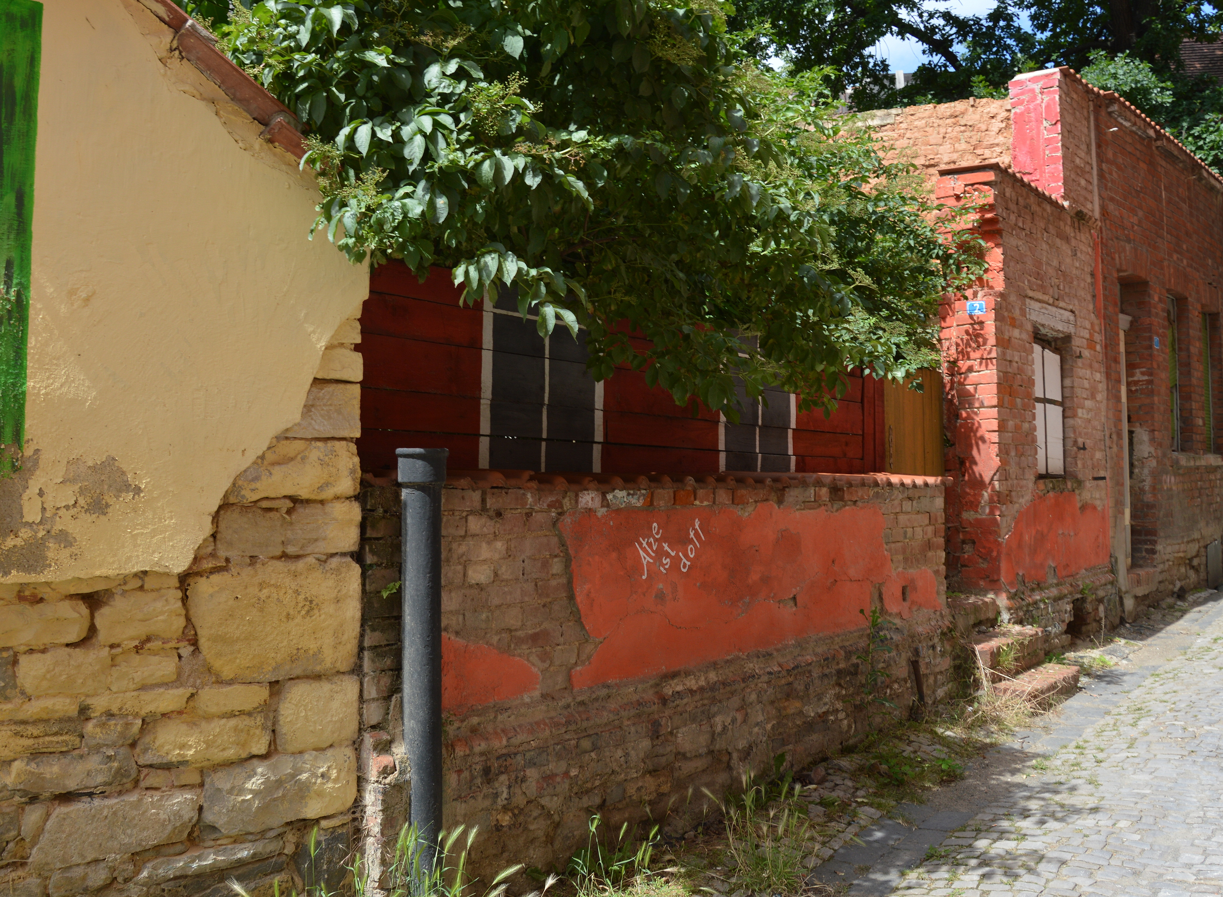 Reste des Hauses Kleiner Halken 2 in Aschersleben